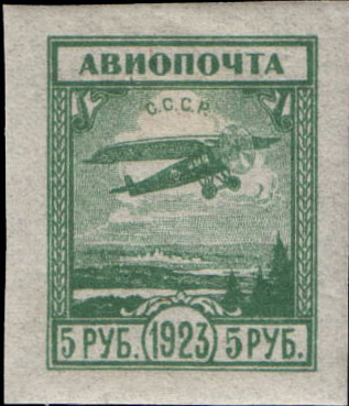 Почтовыя марка СССР